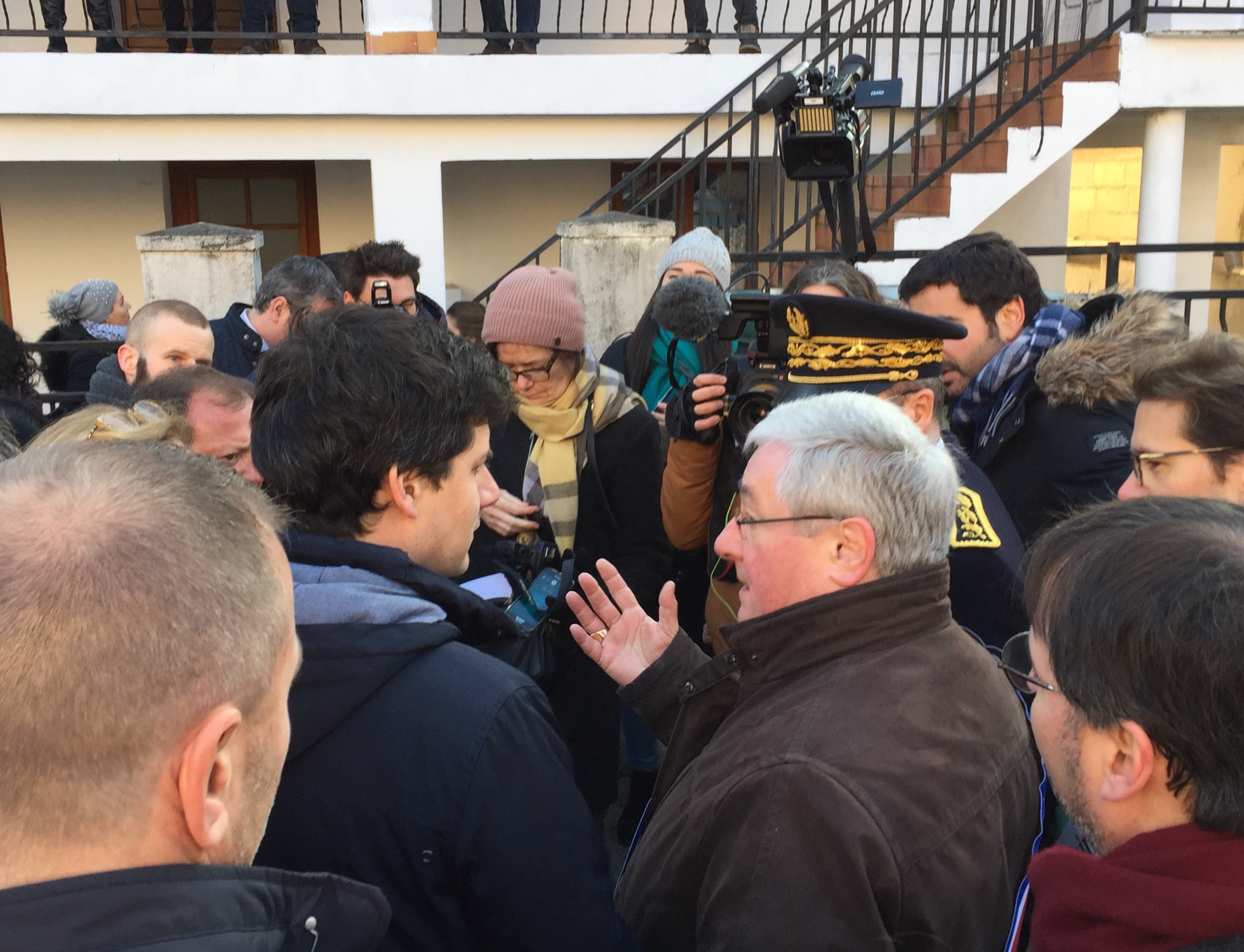 Le ministre délégué au logement et à la politique de la ville Julien Denormandie (de profil, deuxième à gauche) avec le maire Michel Fourcade (de profil, main levée) lors d'une visite ministérielle consacrée au logement indigne à Pierrefitte-sur-Seine le 21 janvier 2019. Photo prise face au 34, rue Alcide d'Orbigny.